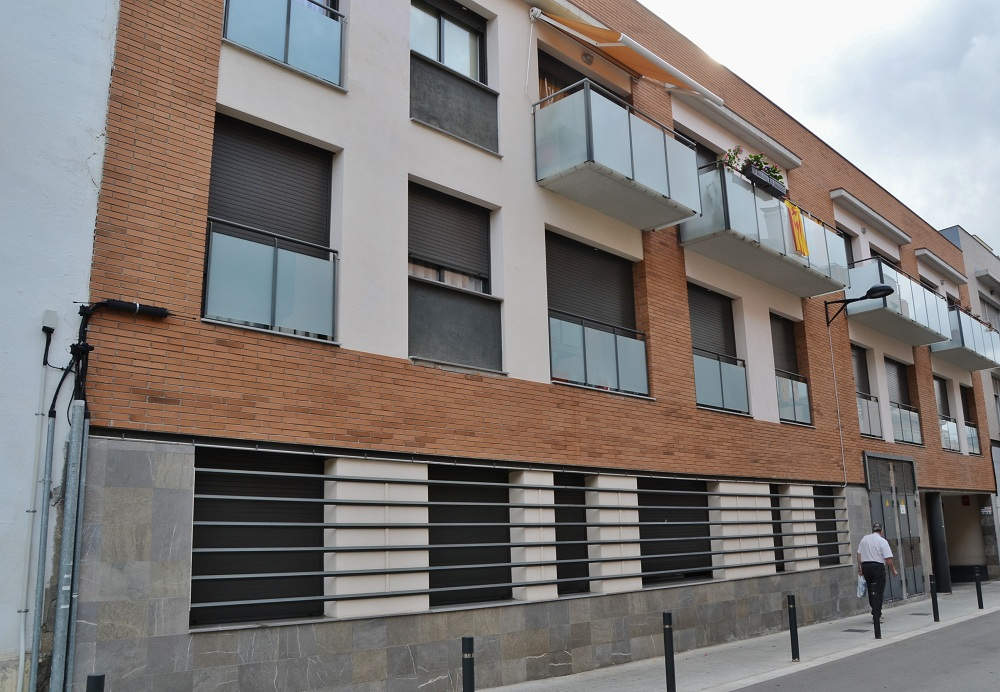 Magatzem de vi Campamà (Vilafranca del Penedès)